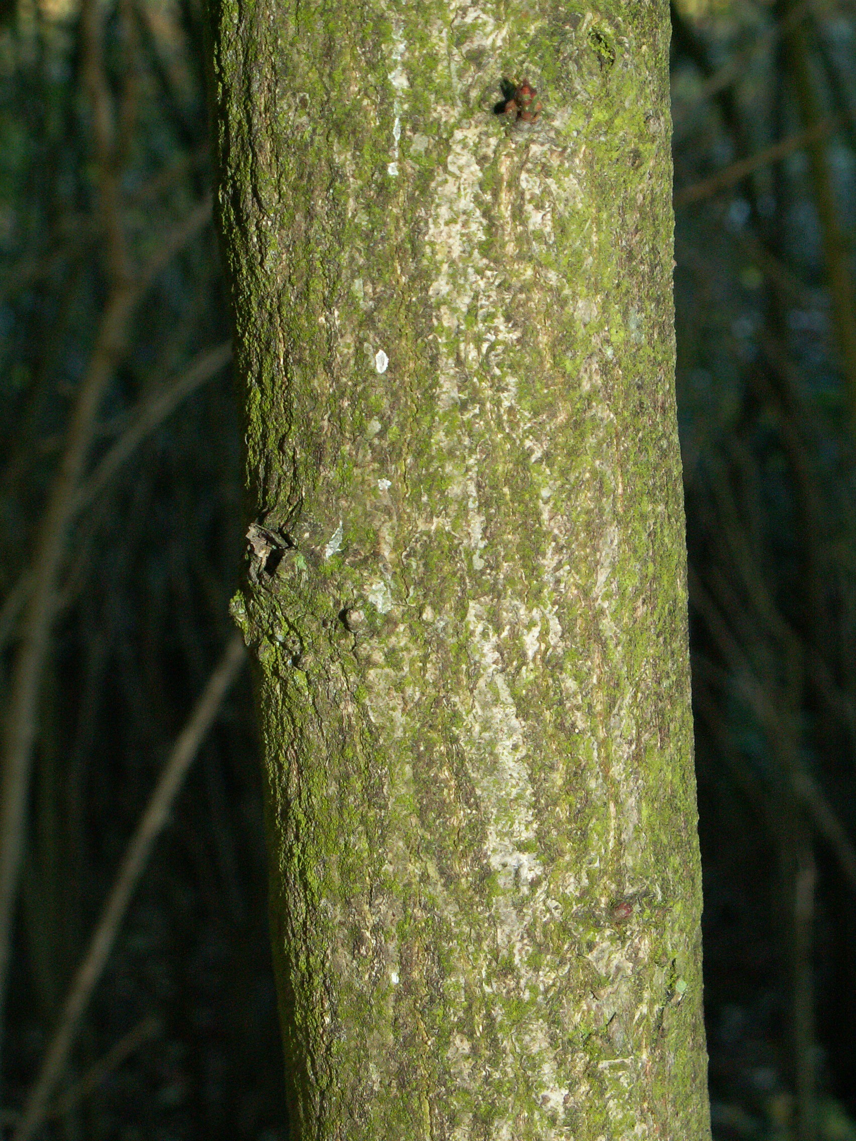 Euonymus europaeus, Dobra k. Szczecina, NW Poland